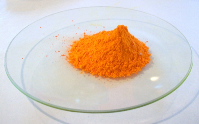 K2Cr2O7